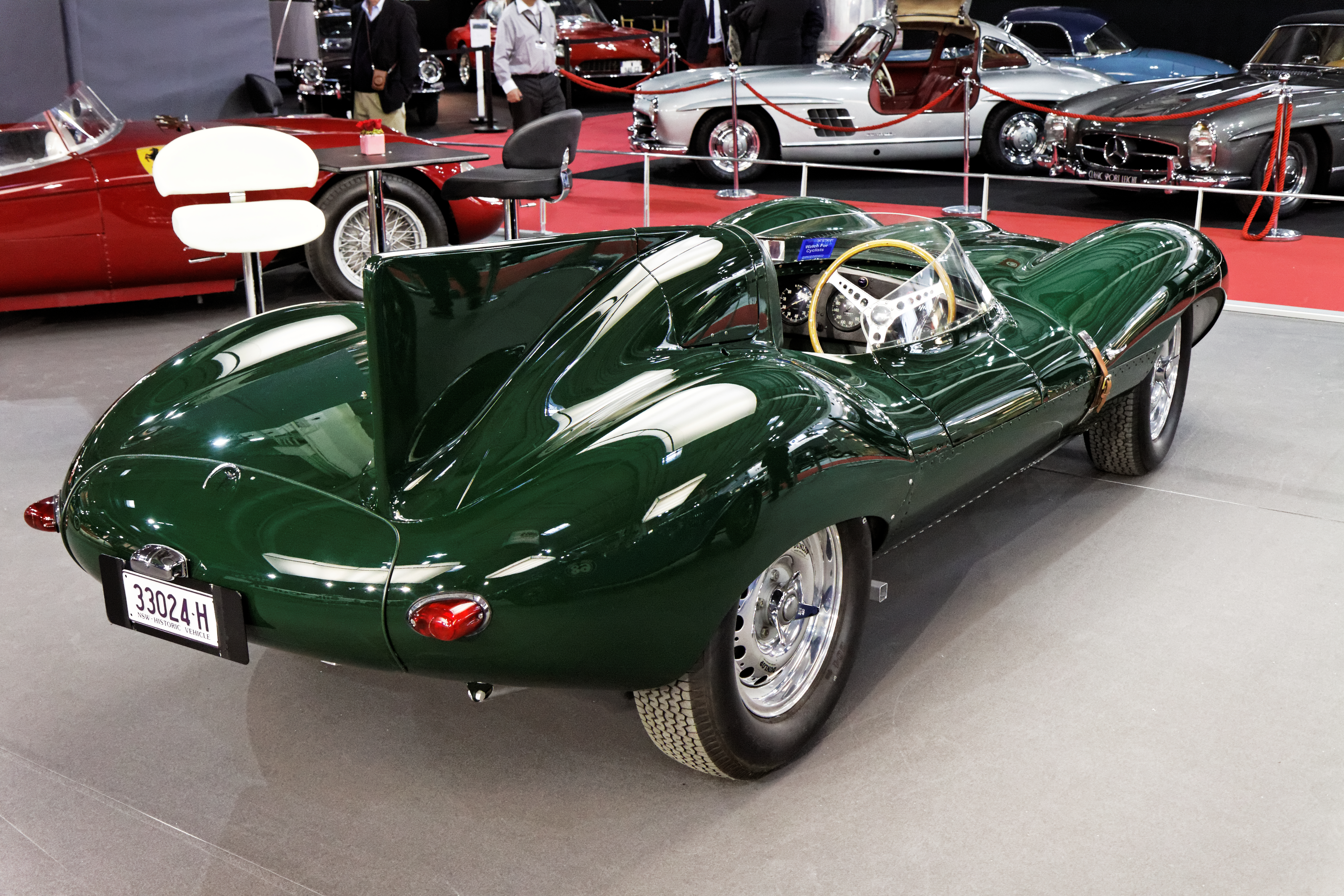 Une Jaguar D Type présentée lors du salon Retromobile 2013.